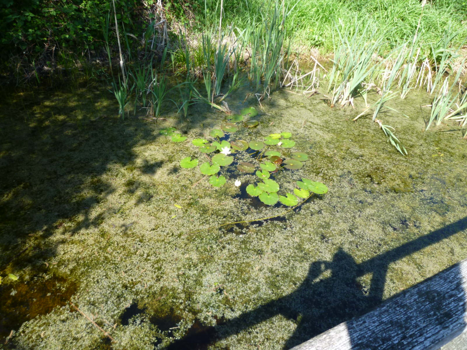 Drömlingsinformationsareal Kämkerhorst bei Calvörde, 2011, Der Teich